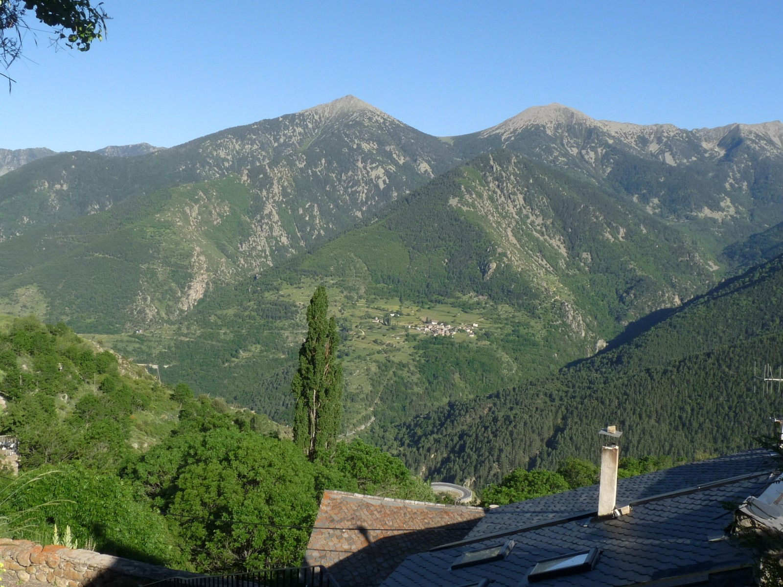 Sauto, vue vers le col Mitjà, Pyrénées-Orientales, France